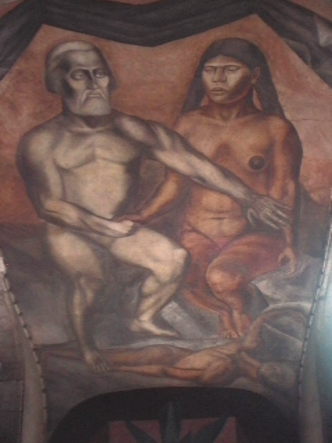 Los más grandes muralistas mexicanos tienen su espacio en la antigua Escuela Nacional Preparatoria he aquí un fragmento.